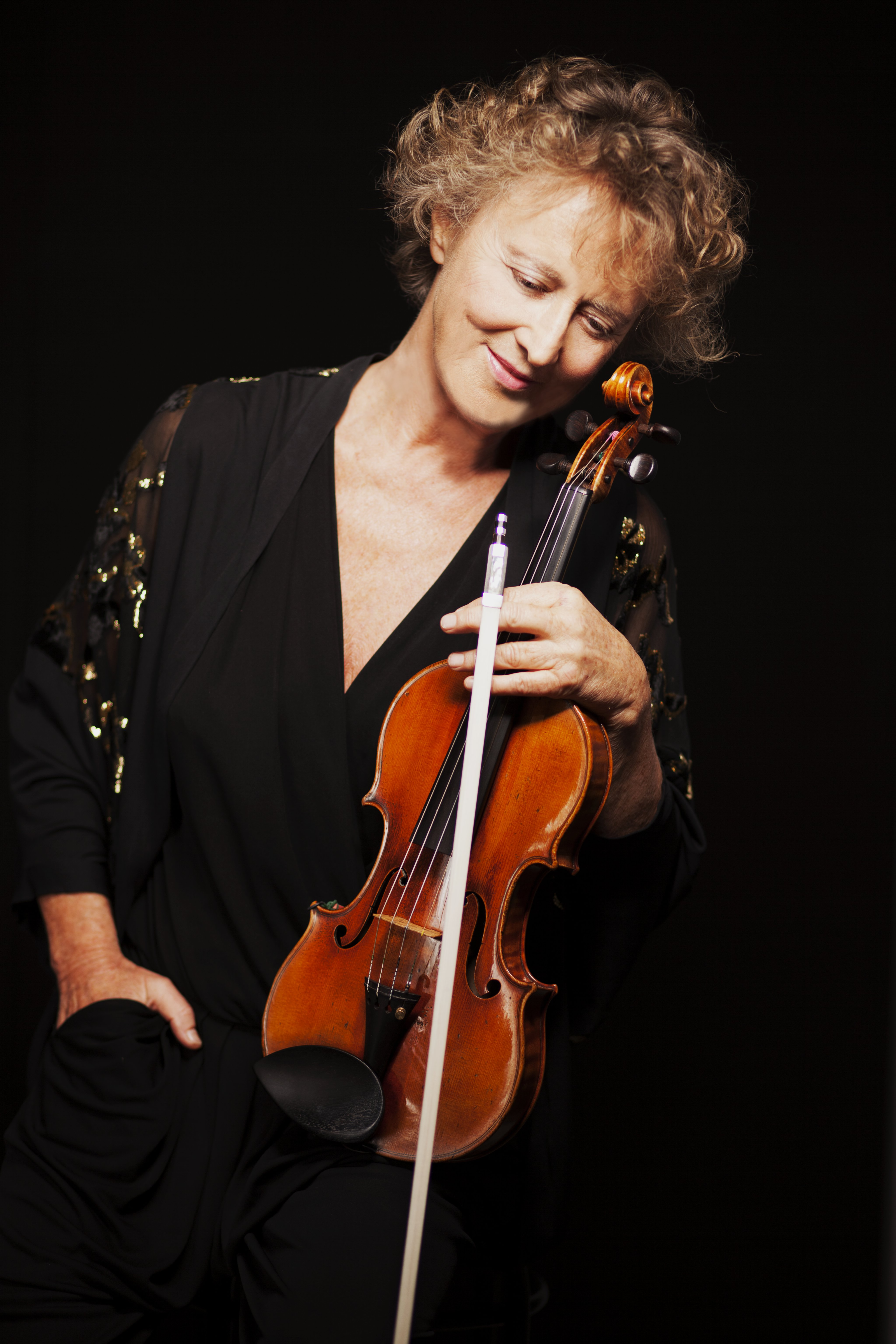 Violinist Renate Eggebrecht